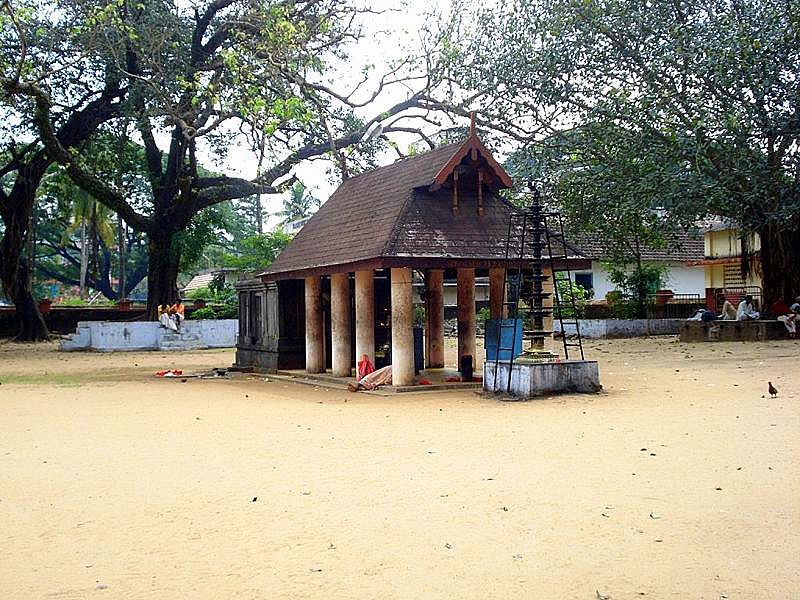 വസൂരിമാലയുടെ പ്രതിഷ്ഠ